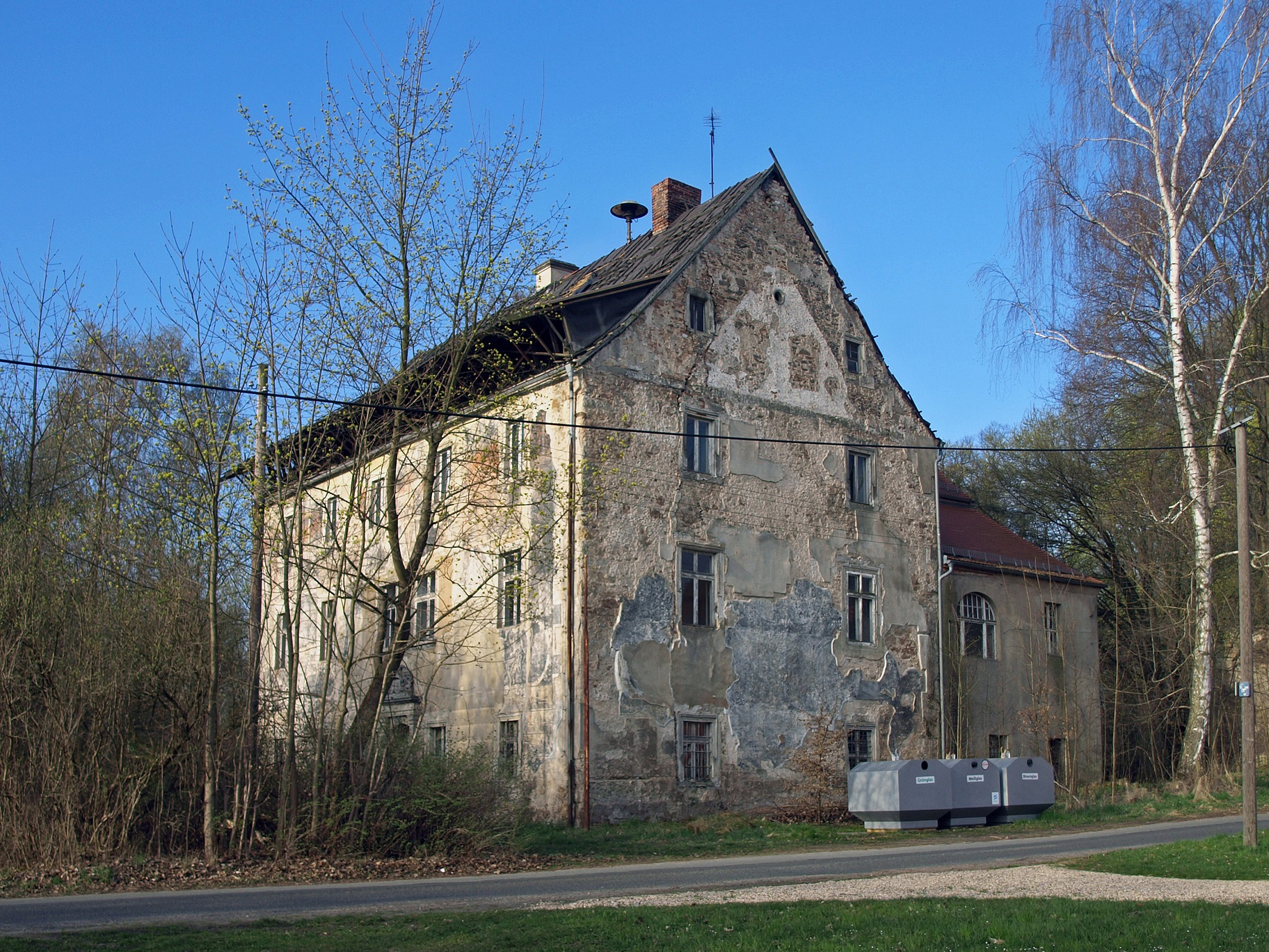 Ruine des Schlosses Ober Neundorf